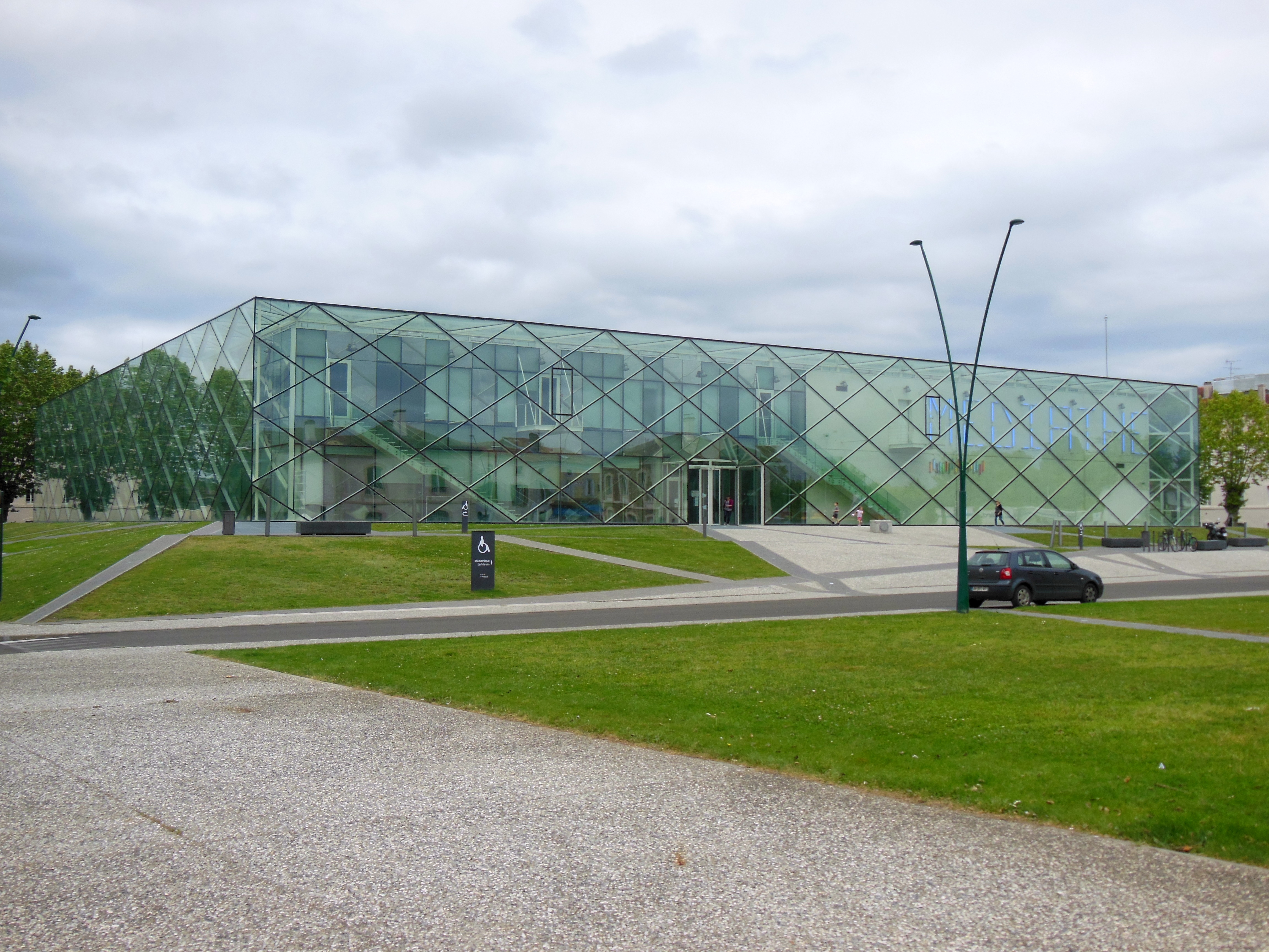 Médiathèque du Marsan Philippe Labeyrie, à Mont-de-Marsan (Landes, France)